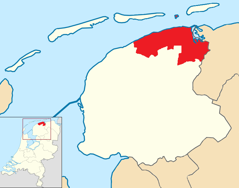 Municipality Noardeast-Fryslân 2019